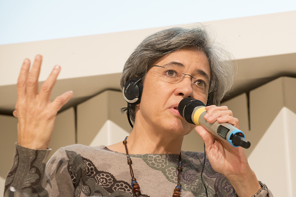 Alemanha | A participação do Brasil na Feira de Frankfurt se deu por meio dos ministérios da Cultura e Relações Exteriores, FBN, Fundação Nacional de Artes (Funarte), Câmara Brasileira do Livro, com apoio da Embratur, Agência Brasileira de Promoção de Exportações e Investimentos (Apex-Brasil) e Sesc São Paulo. bit.ly/1clVotx Foto: Johan Visbeek